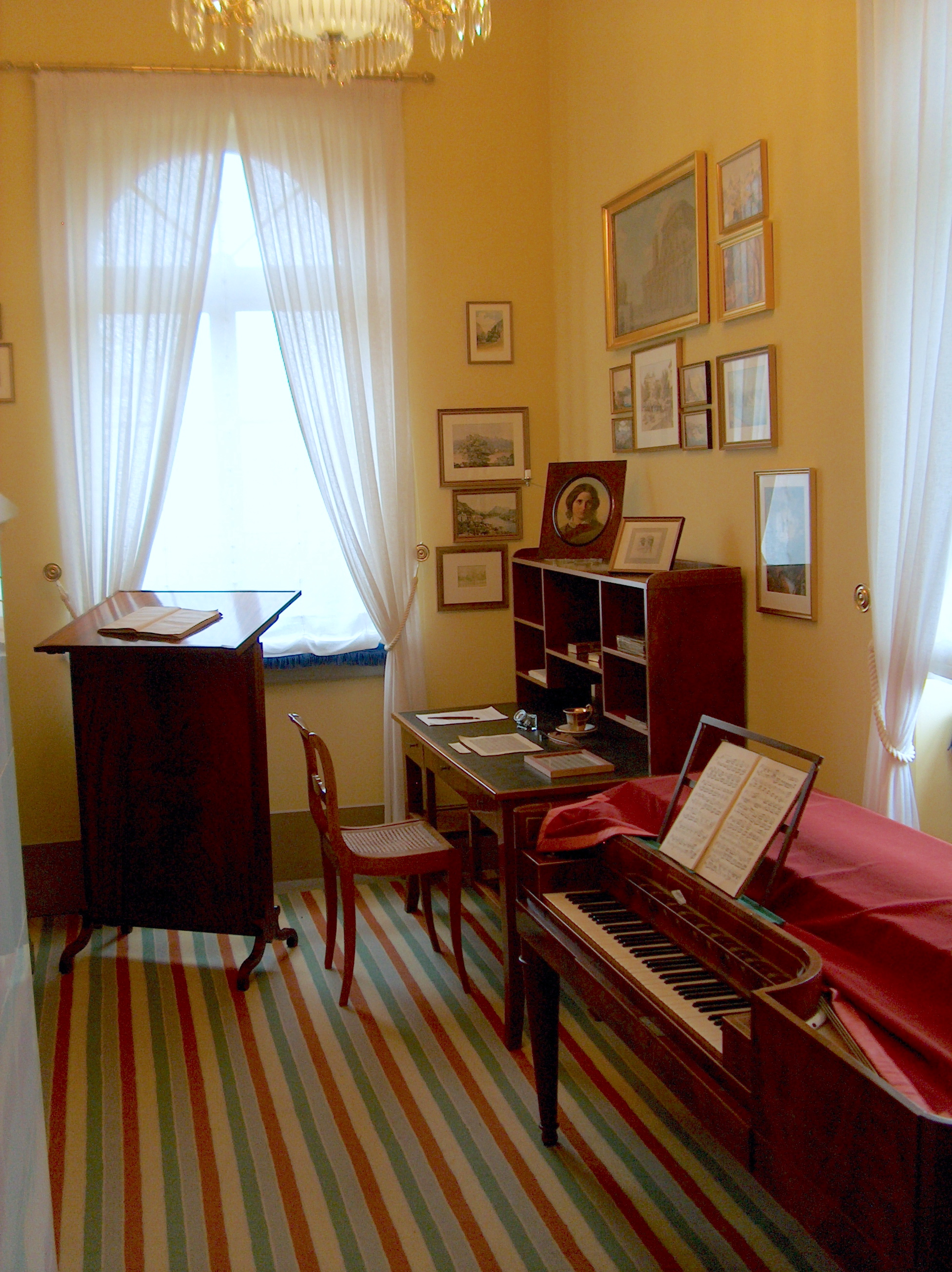 Felix Mendelssohn's Leipzig study